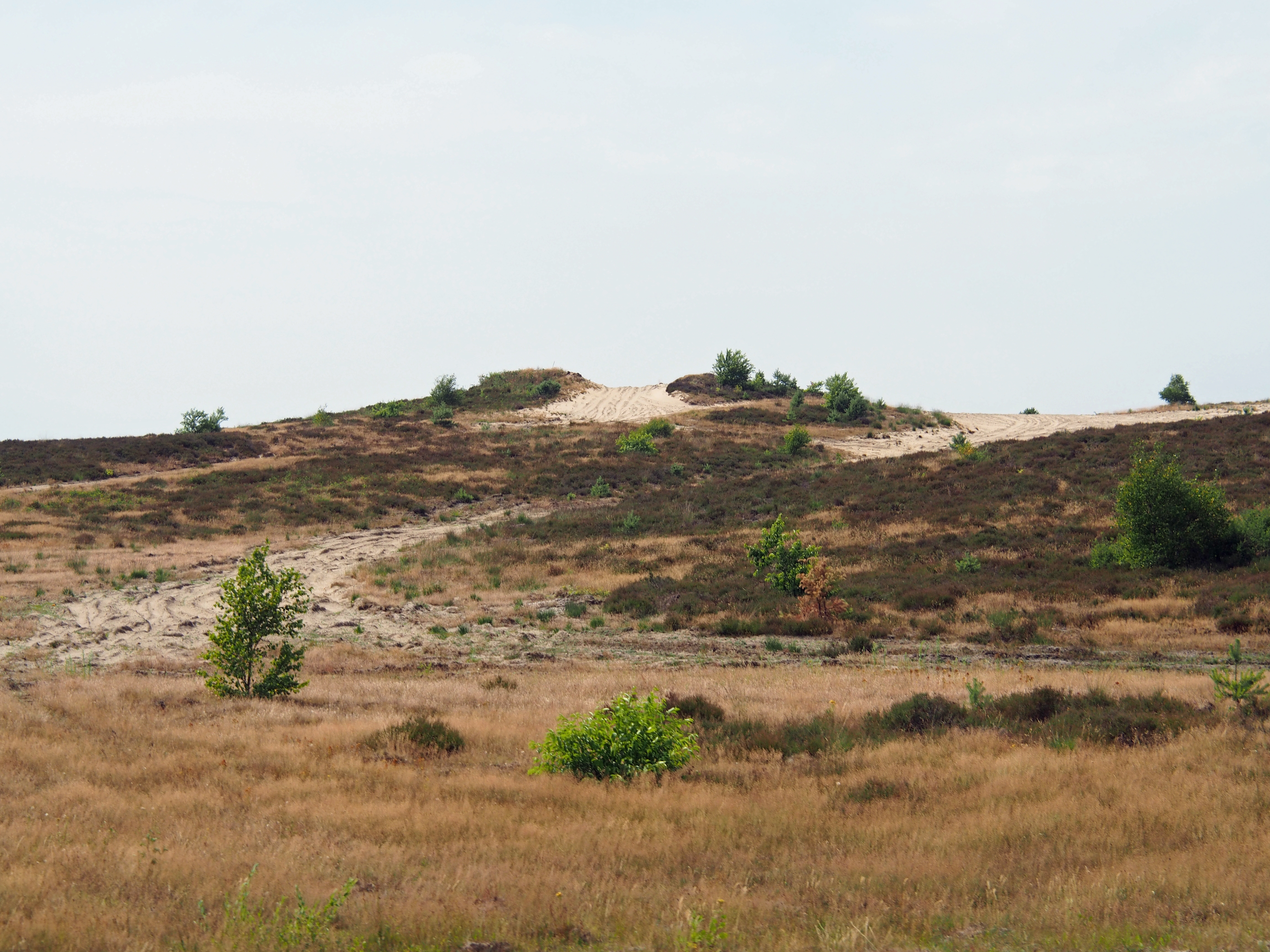 Fundort des "Riesen von Hanglüß" (auf dem Hügel nahe der alten Ortschaft Hanglüß im Truppenübungsplatz Bergen)